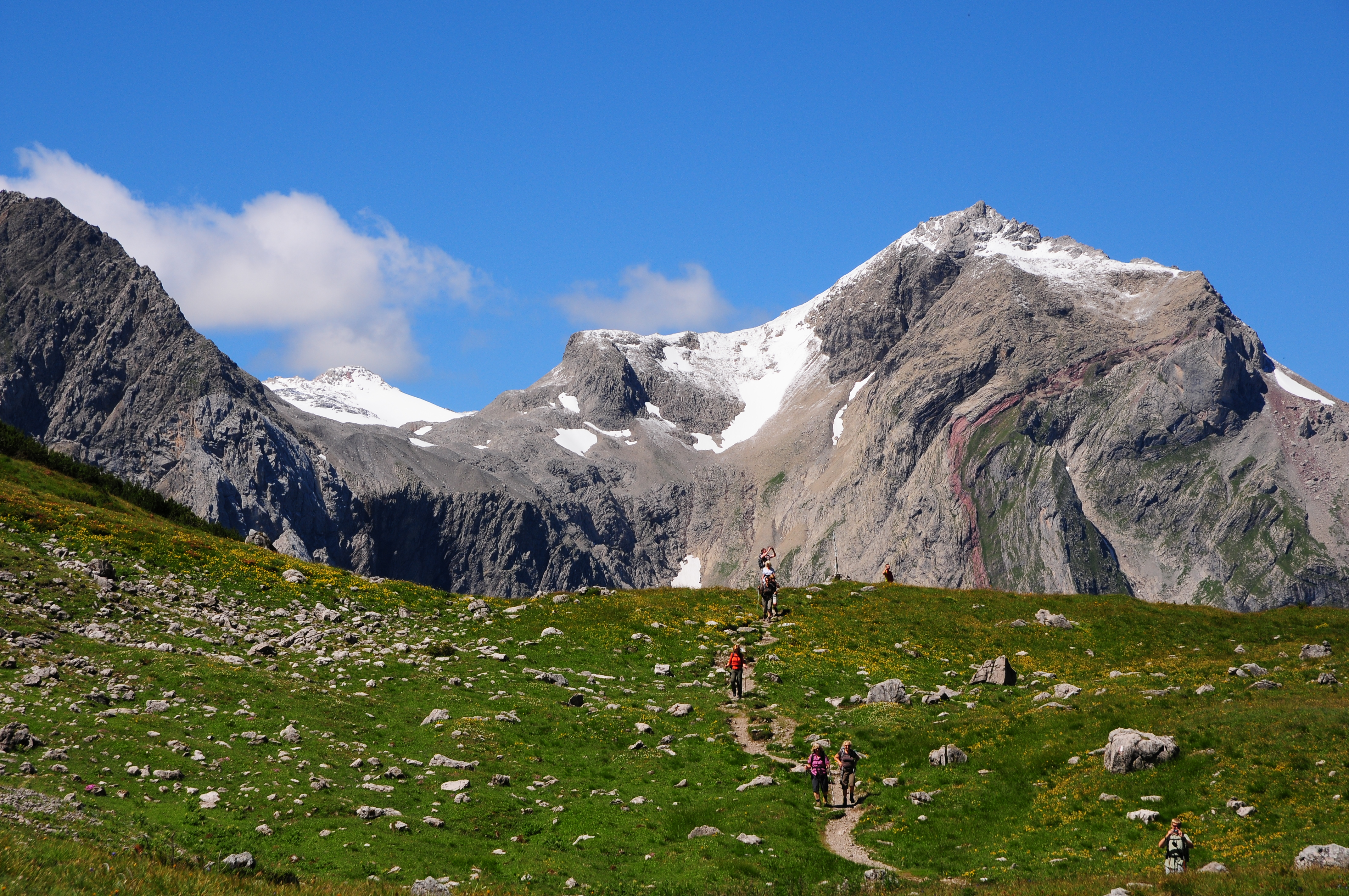 Wanderer auf dem 2065m hohen Saulajoch. Von hier führt der Weg zur Heinrich-Hueter-Hütte oder für Alpinwanderer oder auch Kletterer auf den Saulakopf 2.517m. Im Hintergrund türmt sich, der mit einer roten Ader durzogene, Wilberg 2.788m vor dem Brandner Gletscher auf.